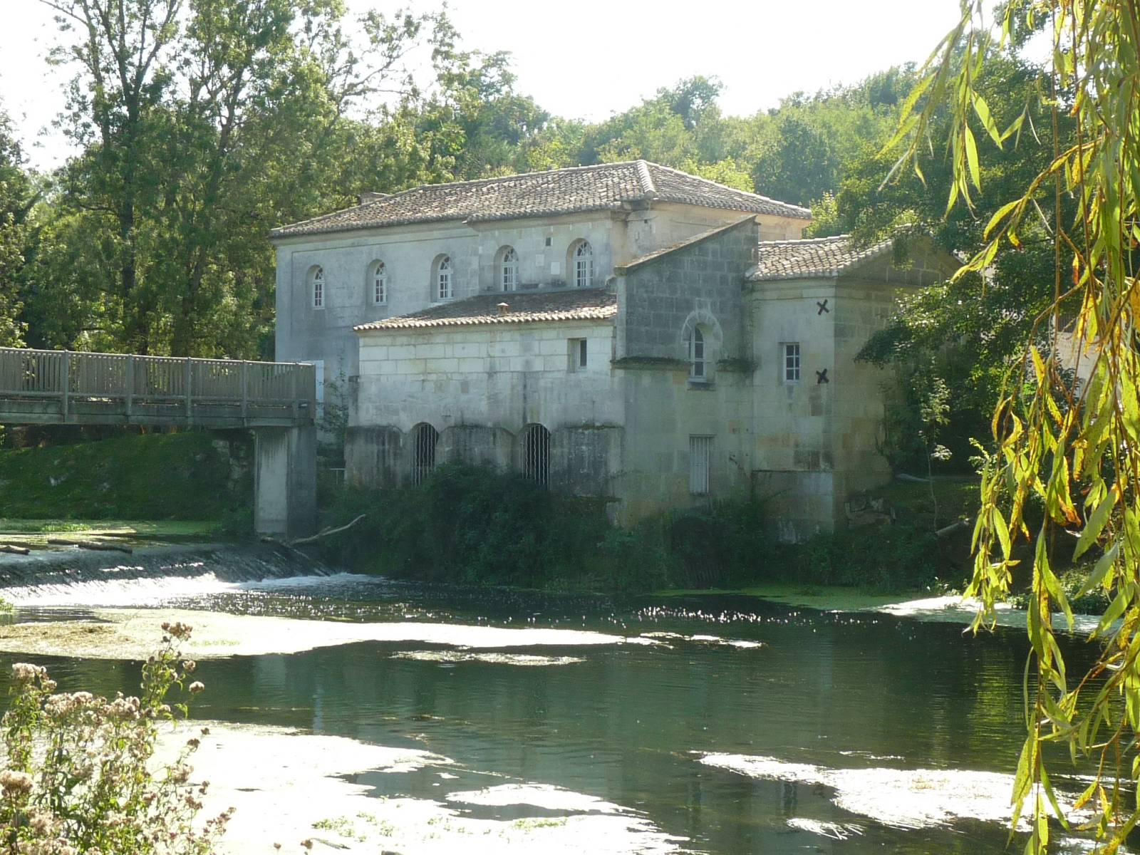 moulin de Fleurac, Nersac (16), France